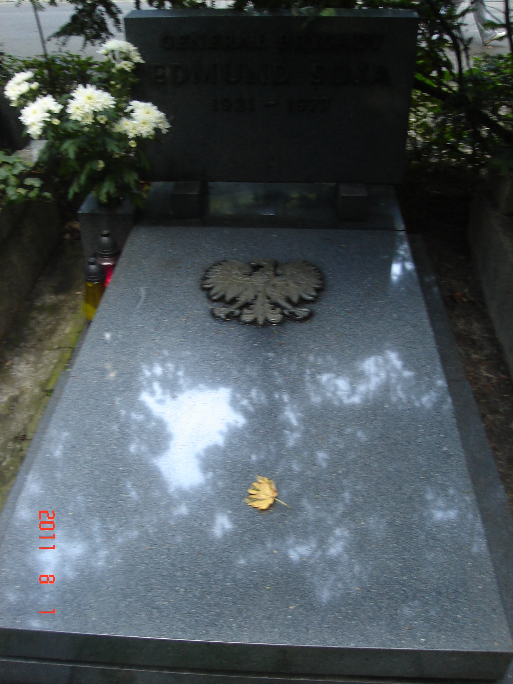 Grób Edmunda Soji na wojskowych powązkach